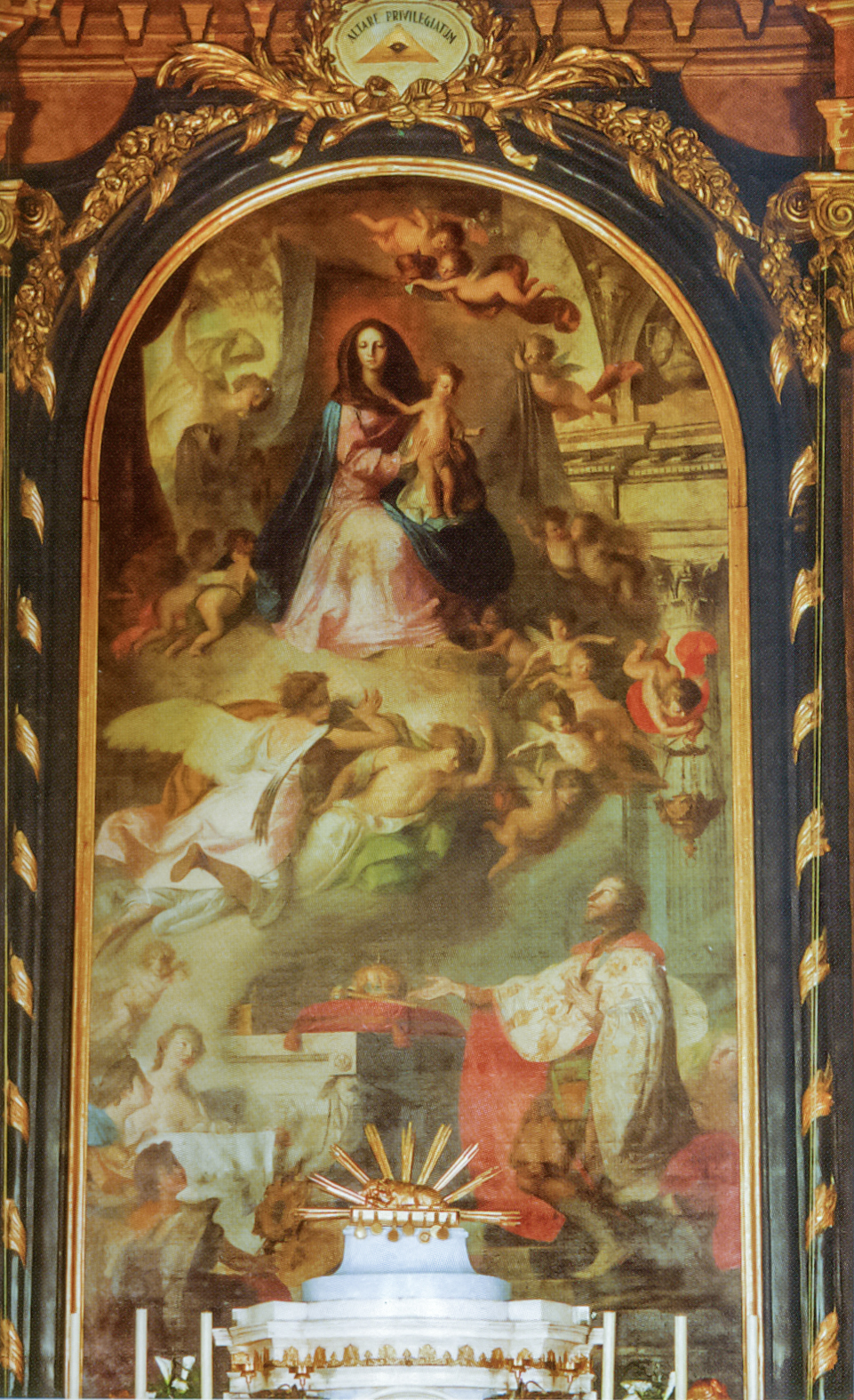 altar painting